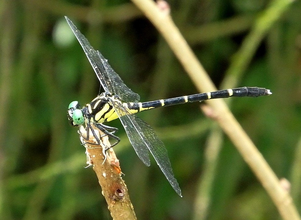 雌蟲 female